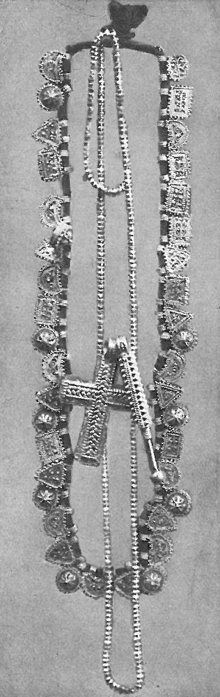 Maatab